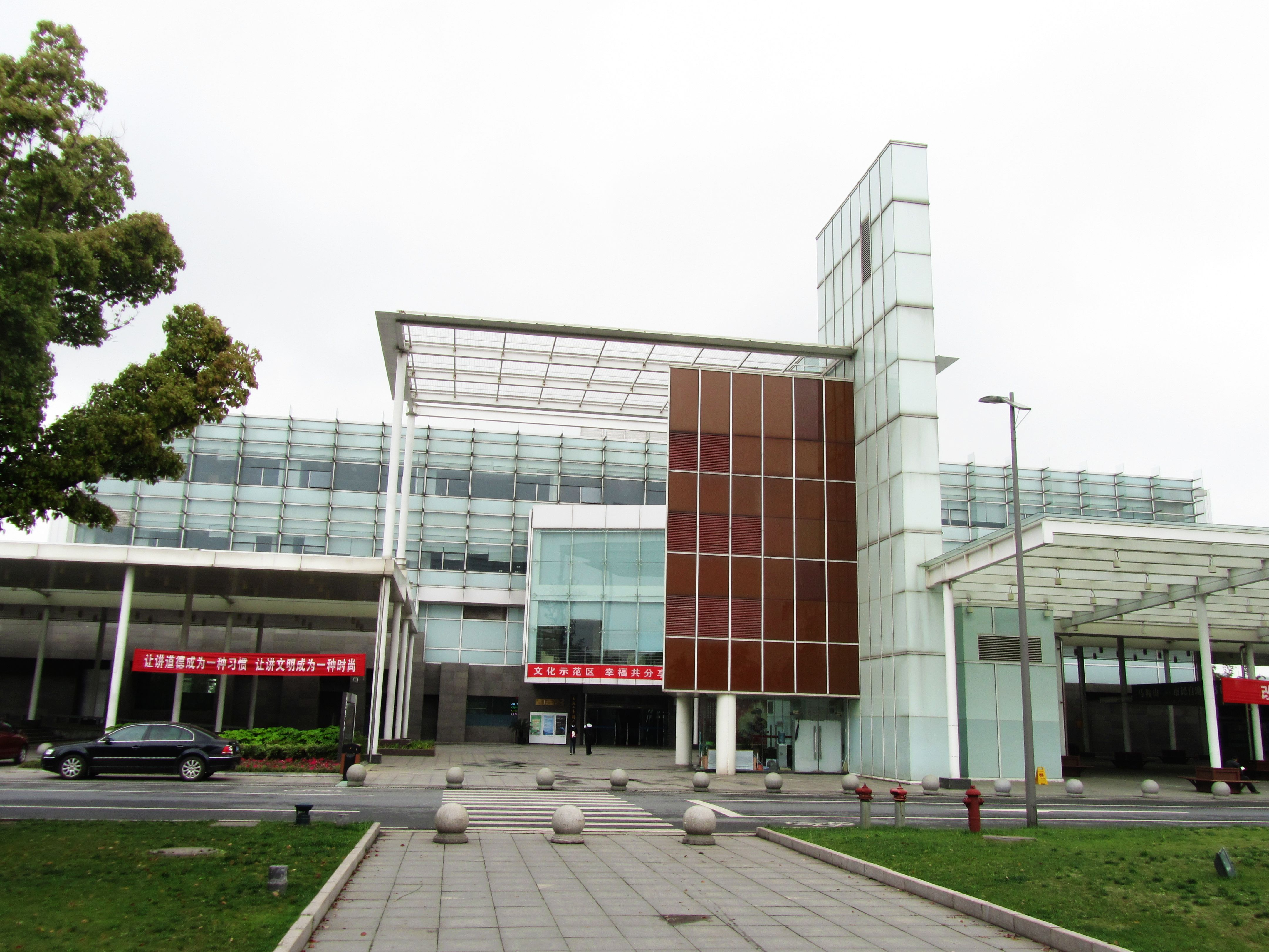 马鞍山市图书馆，北面。